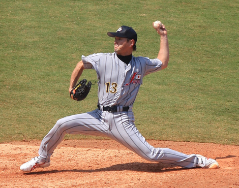 Hitoki Iwase